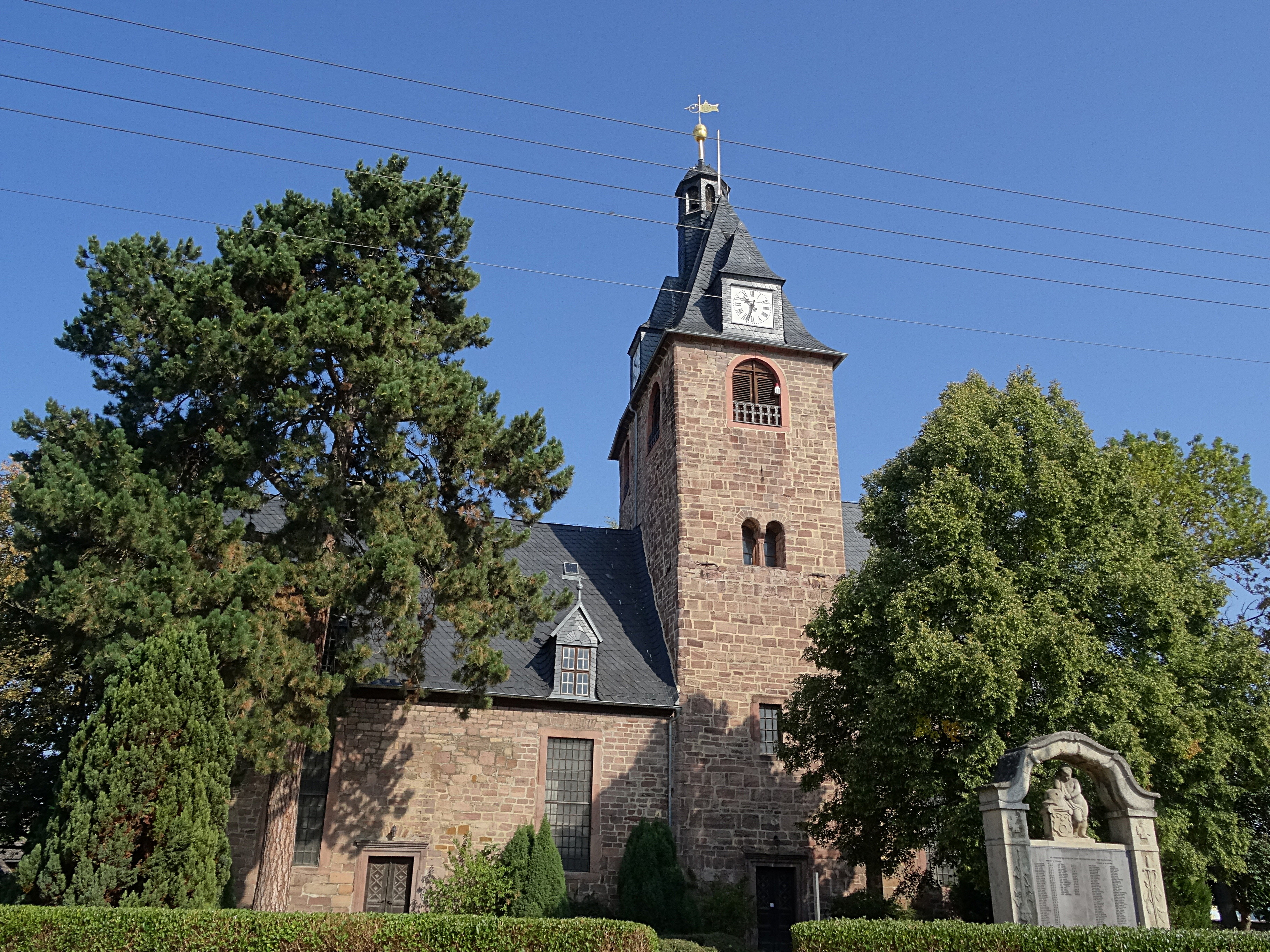 Dorfkirche St. Valentin, Ringleben (Artern)